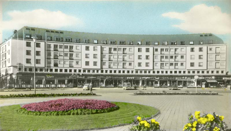 Spektrumhuset. Handkolorerad variant av ac1128.; Affärshus; Byggnadsverk; Handel och bankväsen